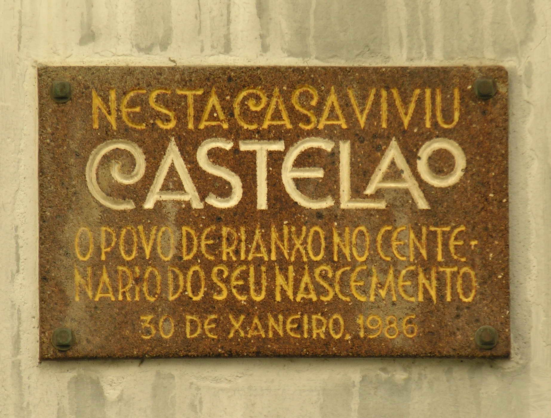 Rianxo, Galicia, Spain, 2006 Publish by= Luis Miguel Bugallo Sánchez. Self made